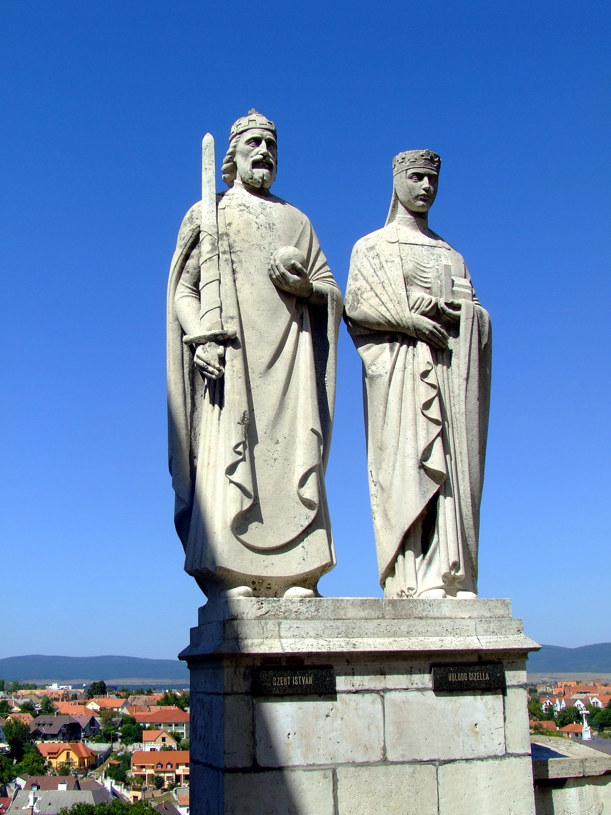 Szent István és Boldog Gizella szobra a veszprémi várban. Ispánki József alkotása (1938)